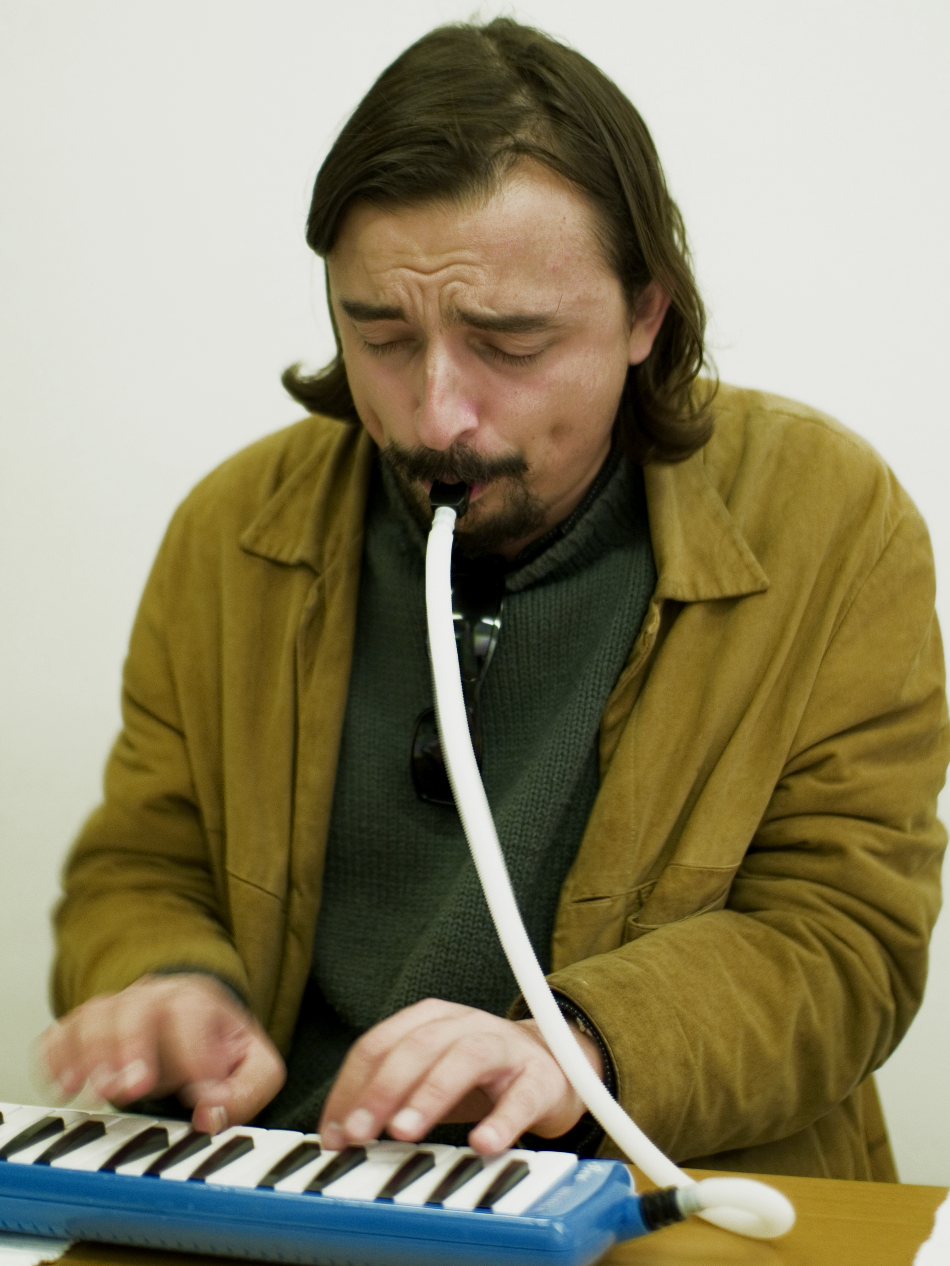 JONAS A TOCAR A SUA MELÓDICA #5